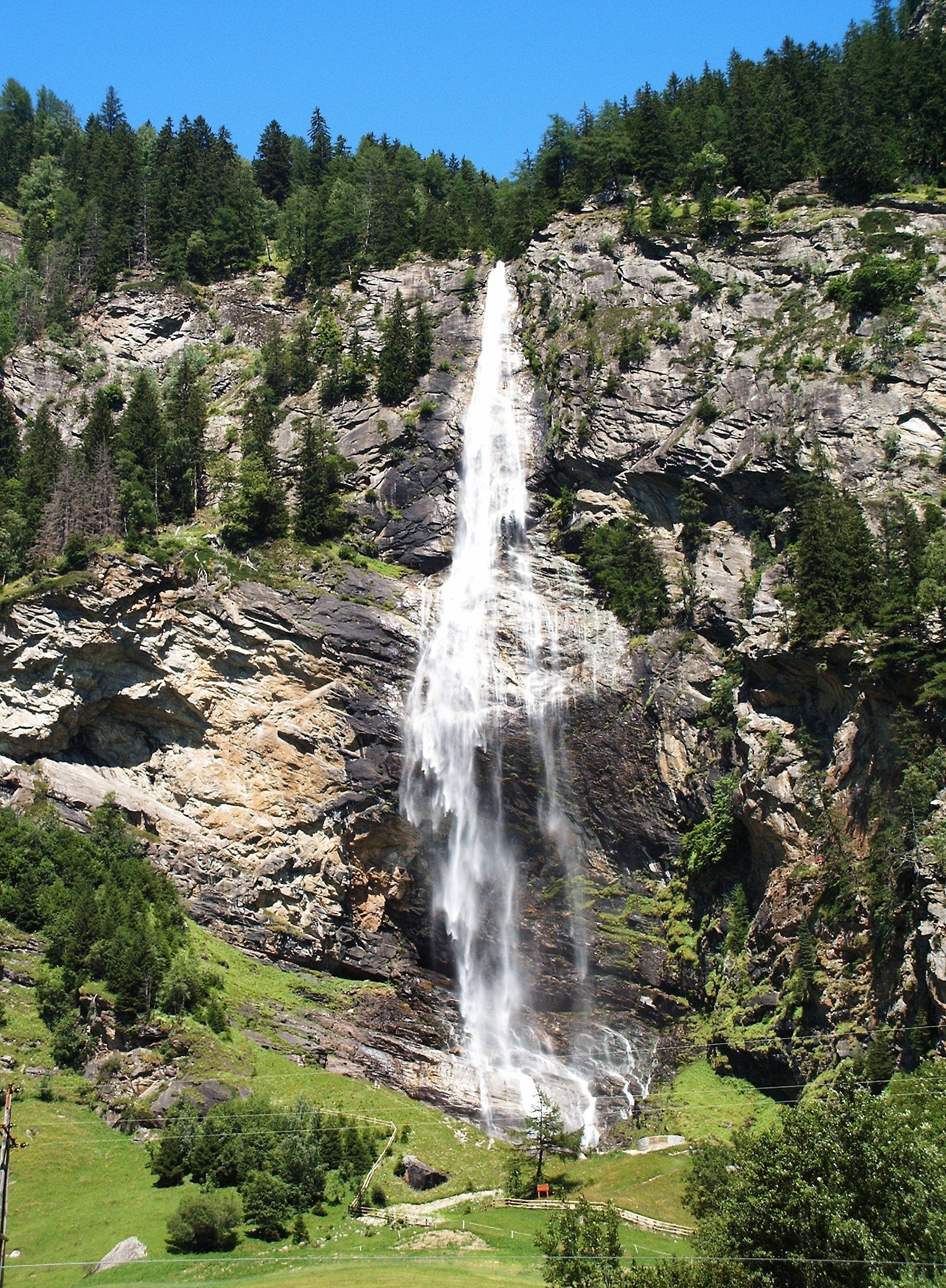 Wasserfall (Fallbach) im Maltatal / Kärnten